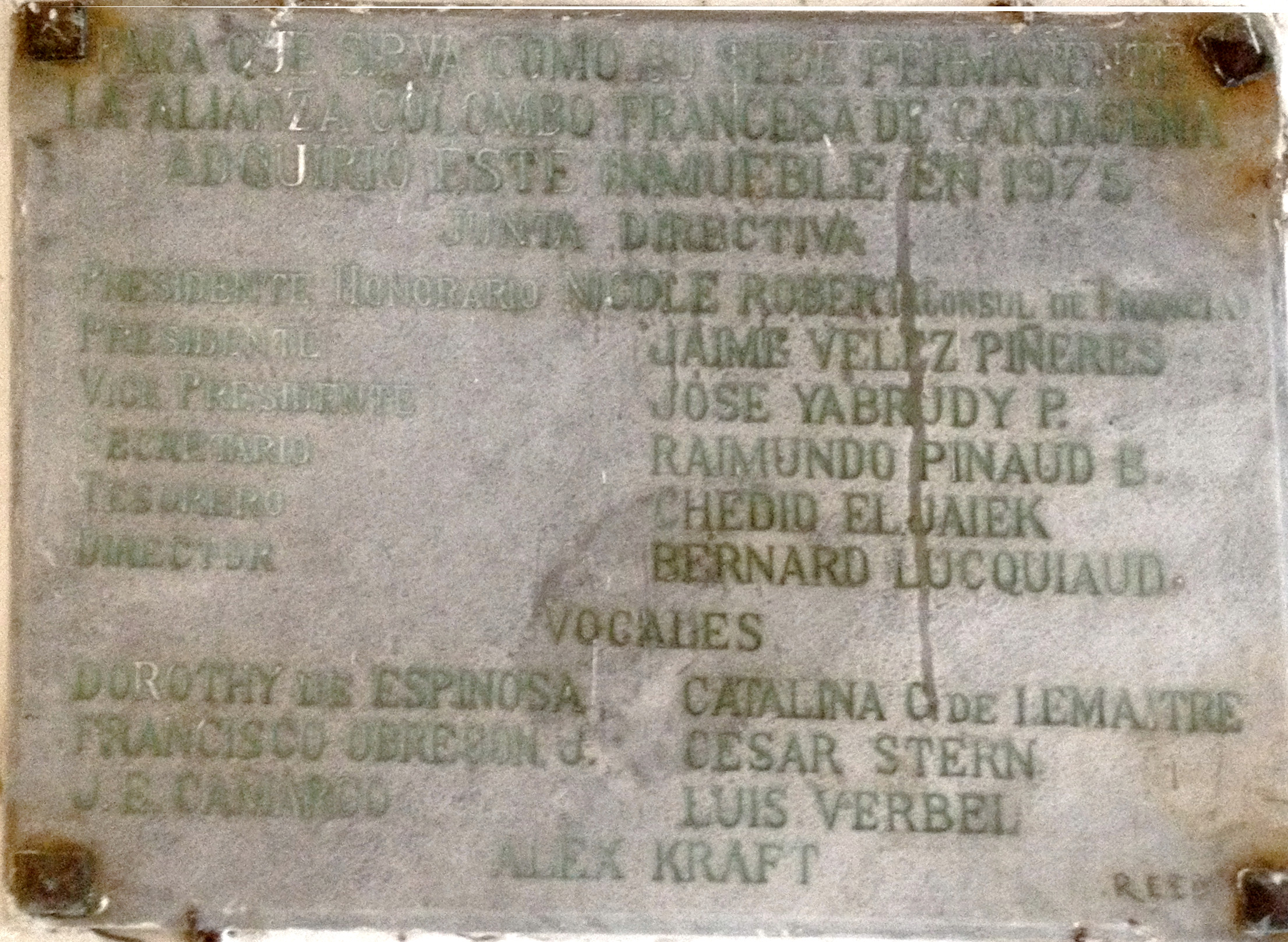 Cette plaque est posée à l'entrée de l'alliance française de Carthagène des Indes en commémoration de l’acquisition de l’édifice ou elle a son siège.